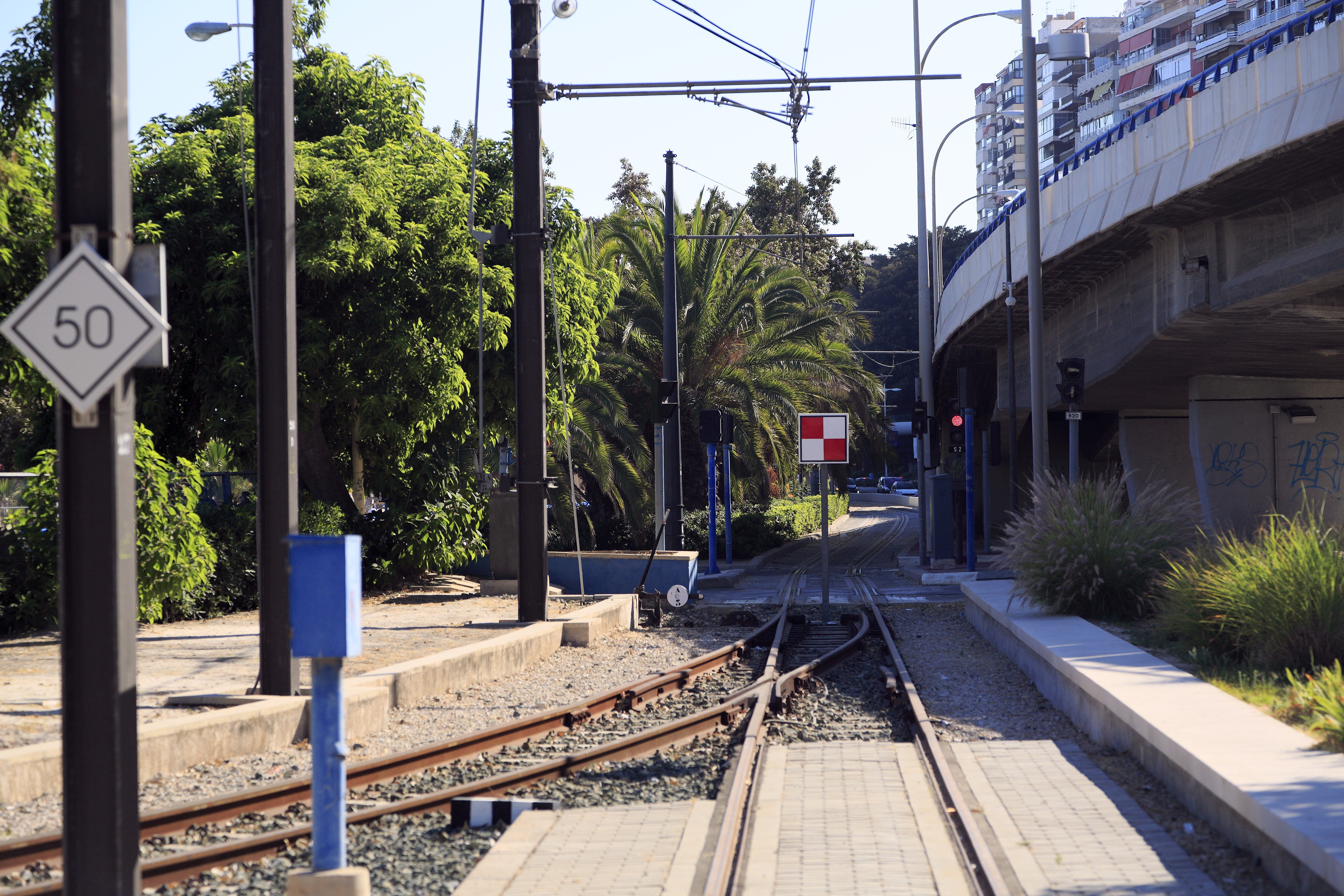 Streckengleis Richtung Puerta del Mar, die Strecke ist ab der Spitze der Weiche 3 betrieblich gesperrt.